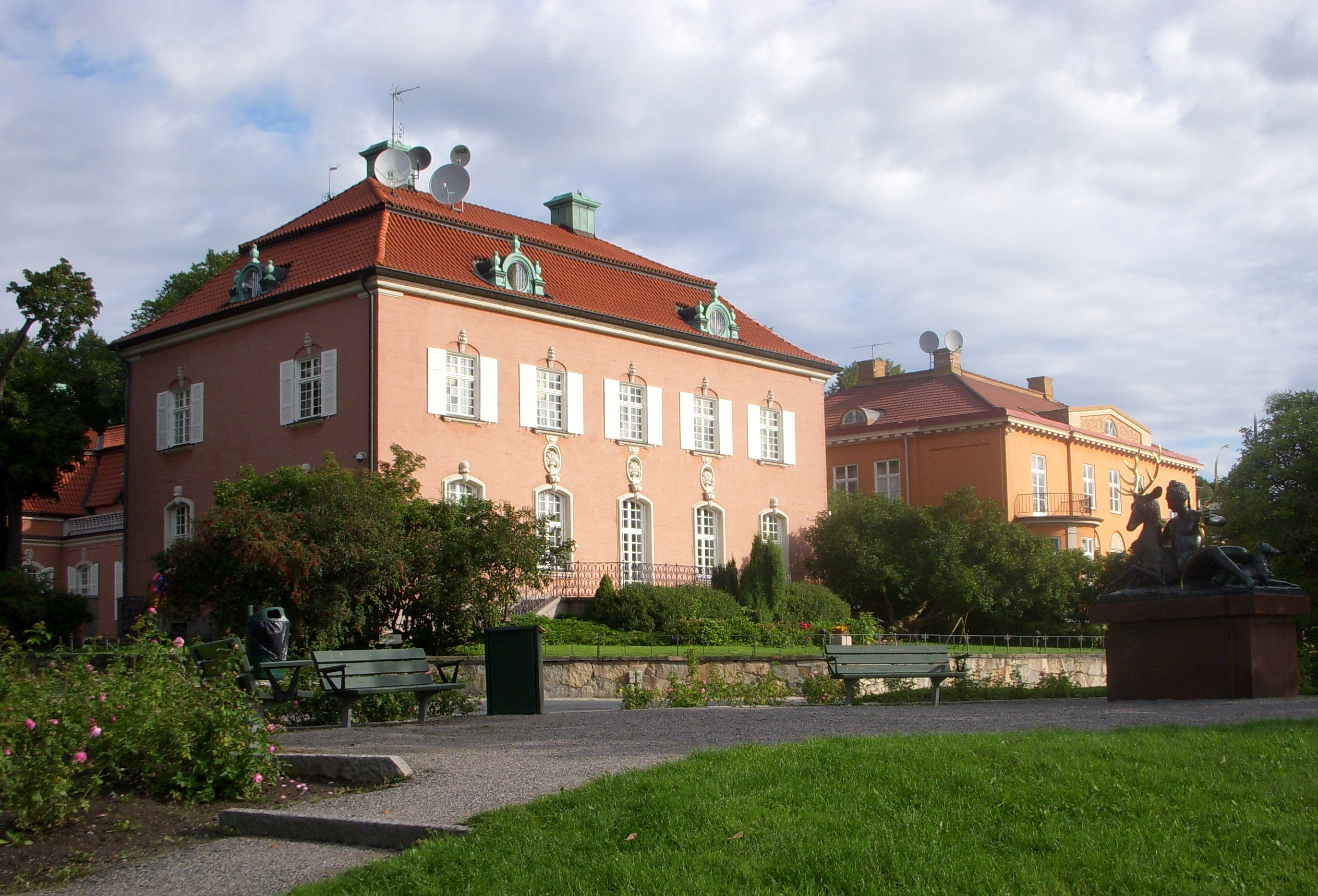 Diplomatstaden i Stockholm, Kv. Ambassadören nr. 1